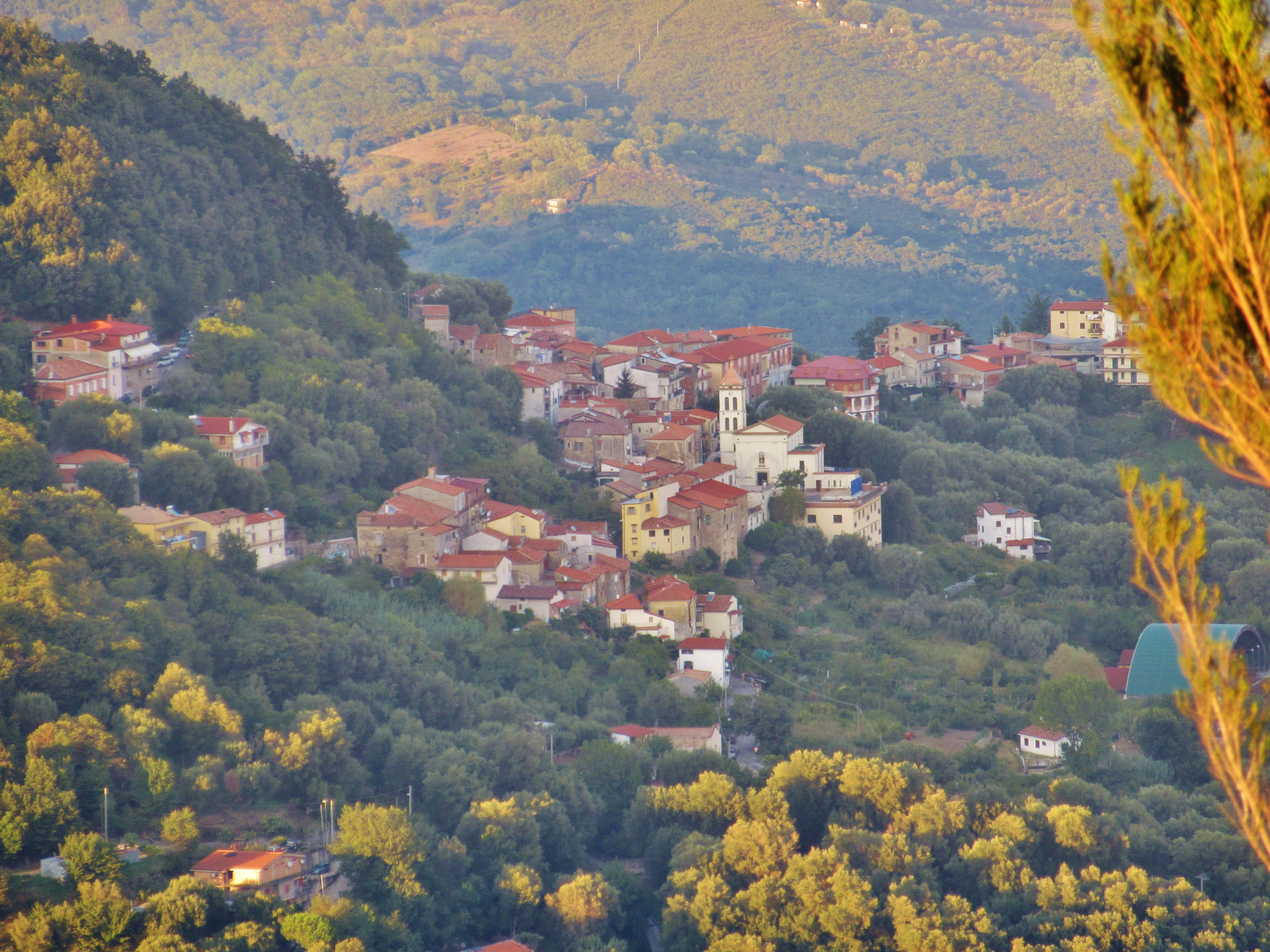 San Mauro La Bruca, panorama.